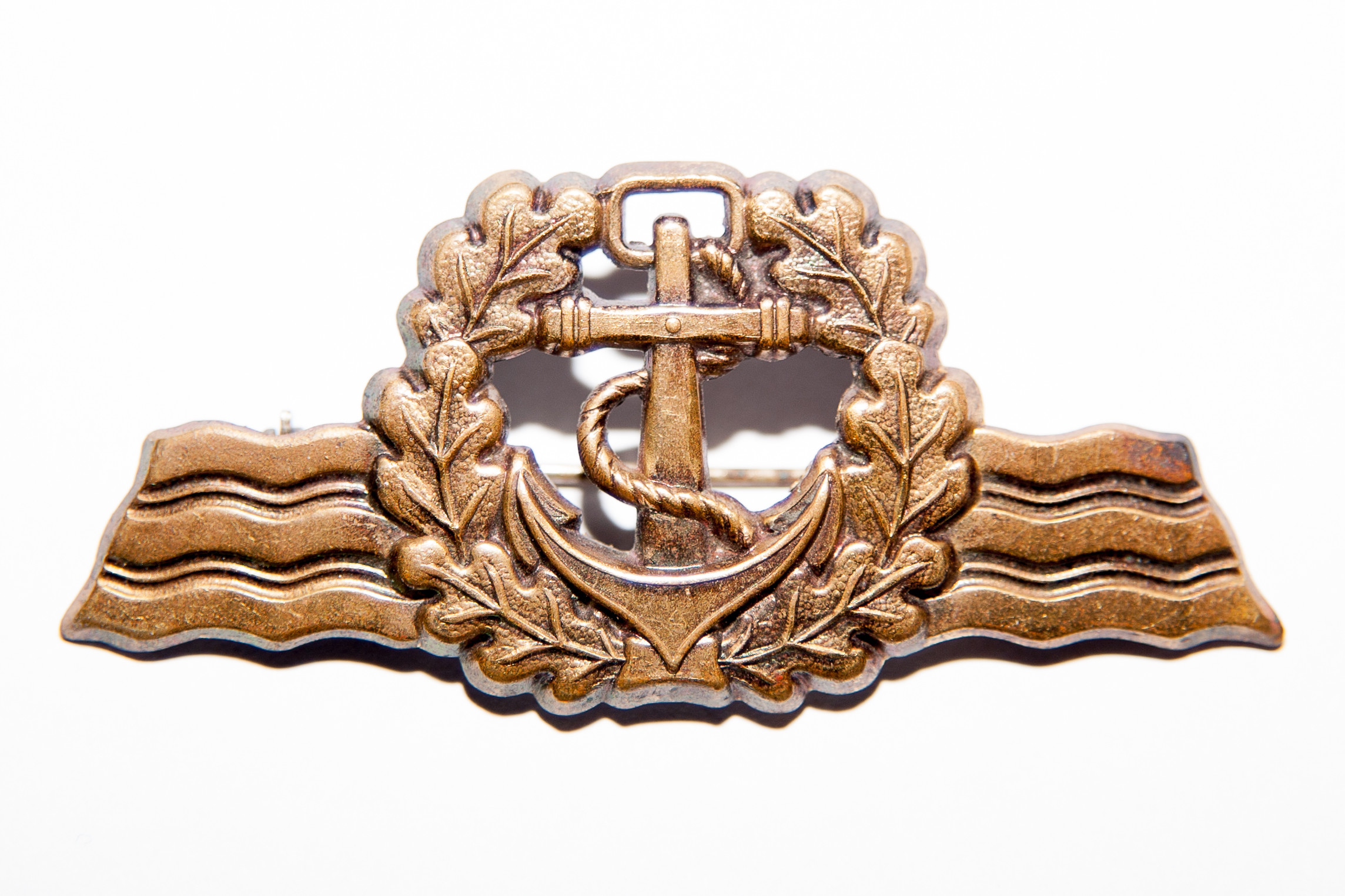 Seefahrerabzeichen der Deutschen Marine in Bronze